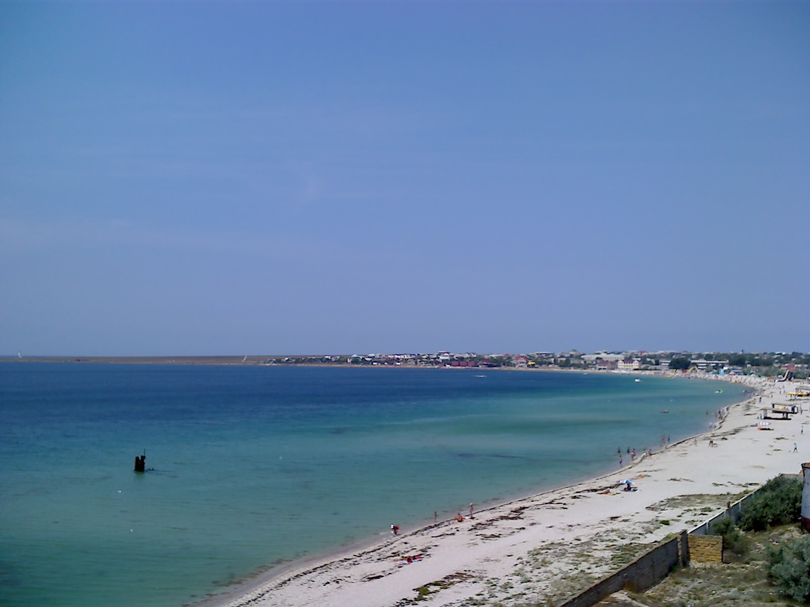 Межводное и береговая линия Ярылгачского залива.